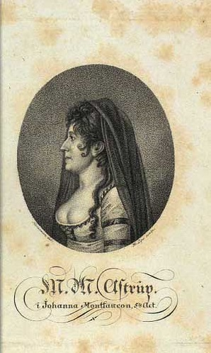 Mette Marie Astrup ( 1760- 1834) skuespillerinde